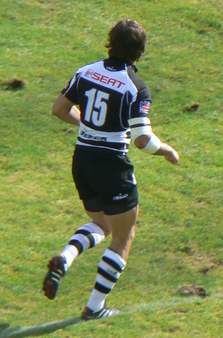 Le rugbyman français Alexis Palisson avec le CA Brive face à l'ASM Clermont Auvergne au stade Marcel Michelin de Clermont-Ferrand.